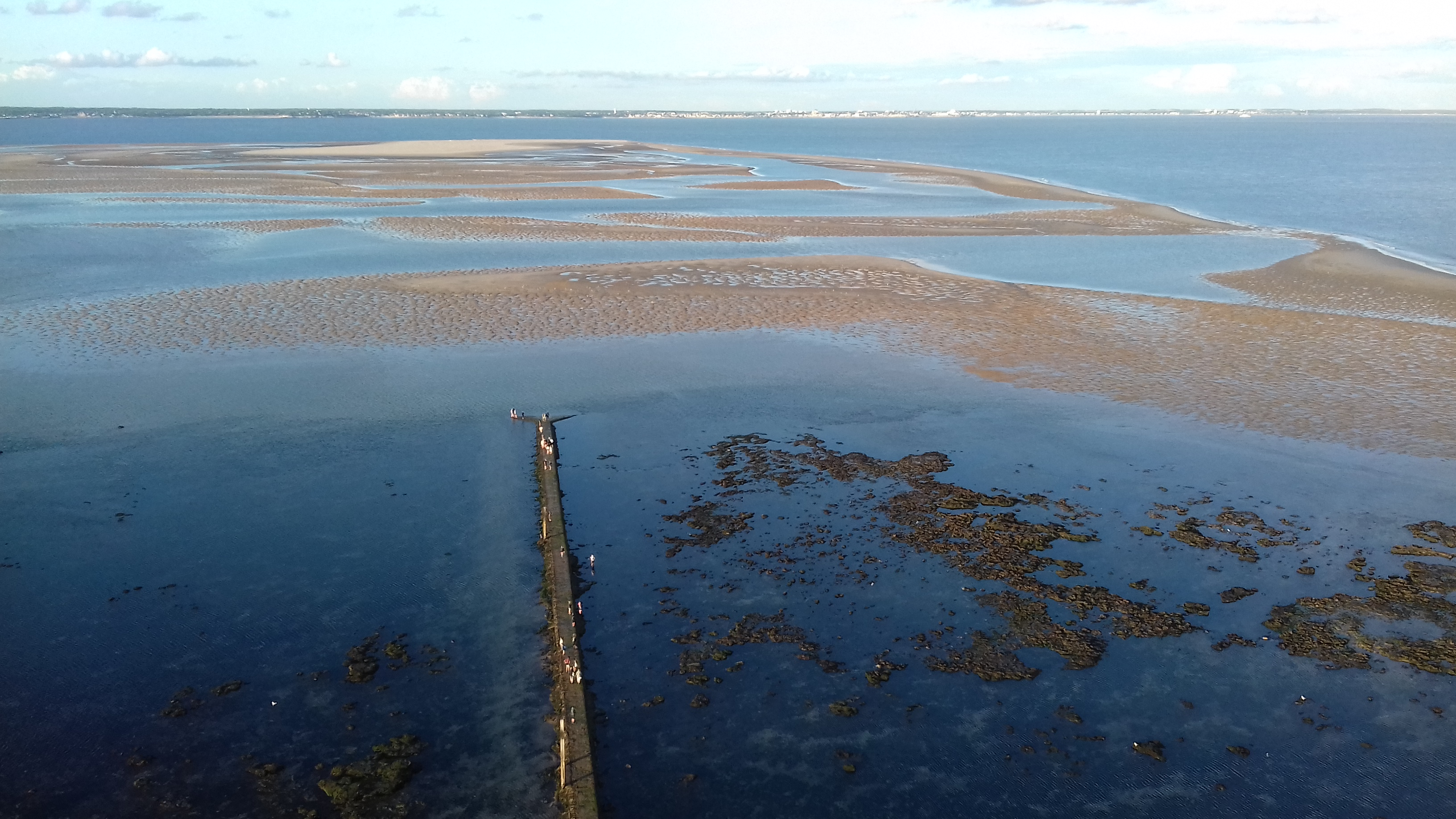 Vue du plateau de Cordouan prise depuis le sommet du phare le 9 août 2018 en fin de journée à marée basse. La côte charentaise est visible sur la ligne d'horizon.